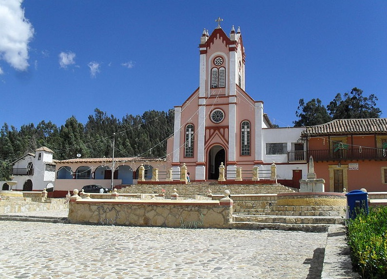 Cuitiva: iglesia y parque